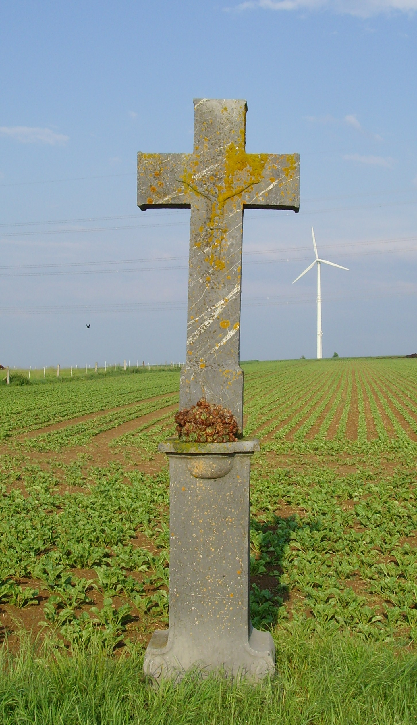 Feldkreuz Hubertushof in Limburg-Offheim